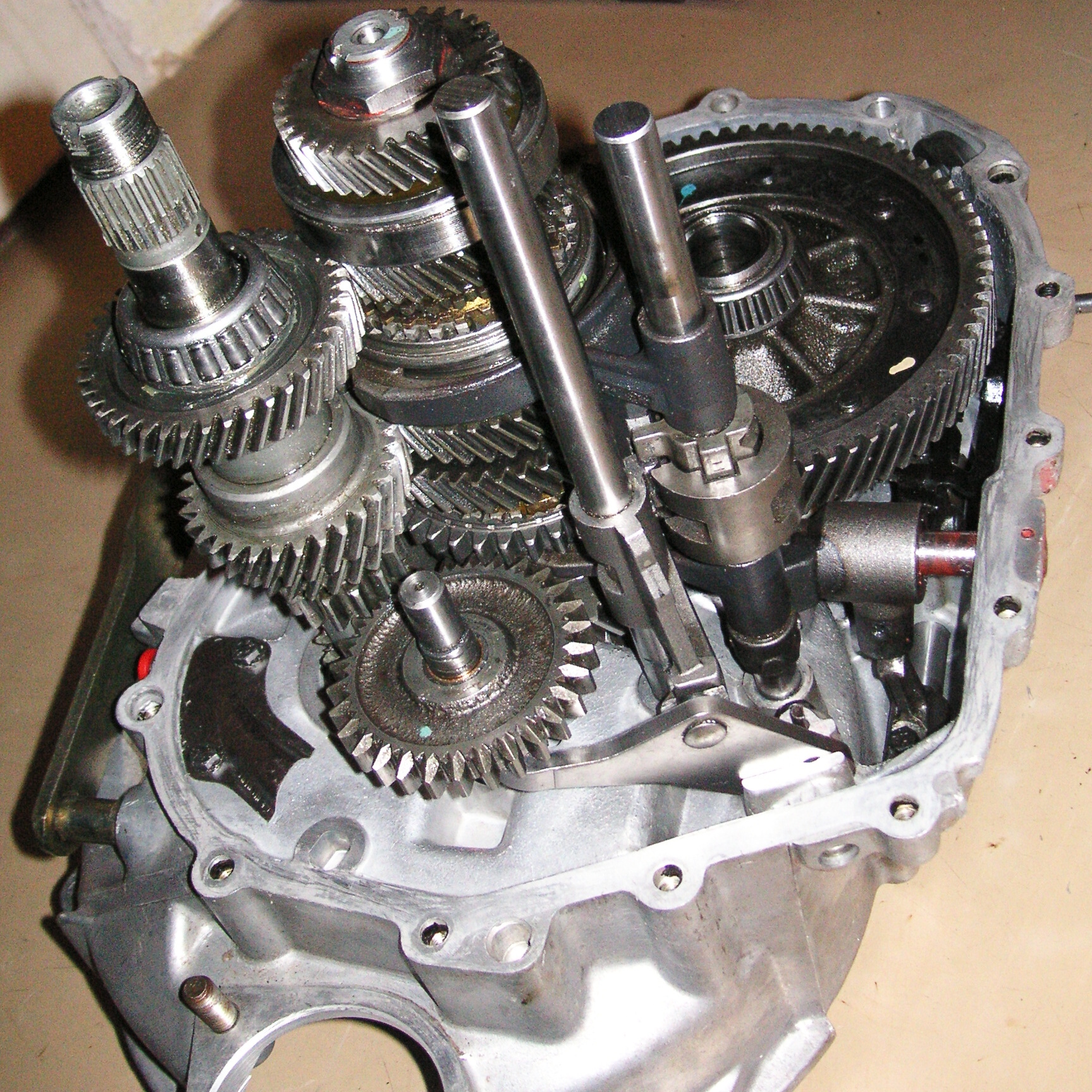 Částečně smontovaná manuální synchronizovaná převodovka osobního automobilu Škoda Favorit (r.v.1992). V popředí je kolo zpátečky na předlohovém hřídeli, nejdelší hřídel je hnací, vedle něj hnaný. v pozadí kolo stálého převodu na skříni diferenciálu. Tyče s vidlicemi jsou součásti řadícího mechanizmu. Vpředu příruba startéru.